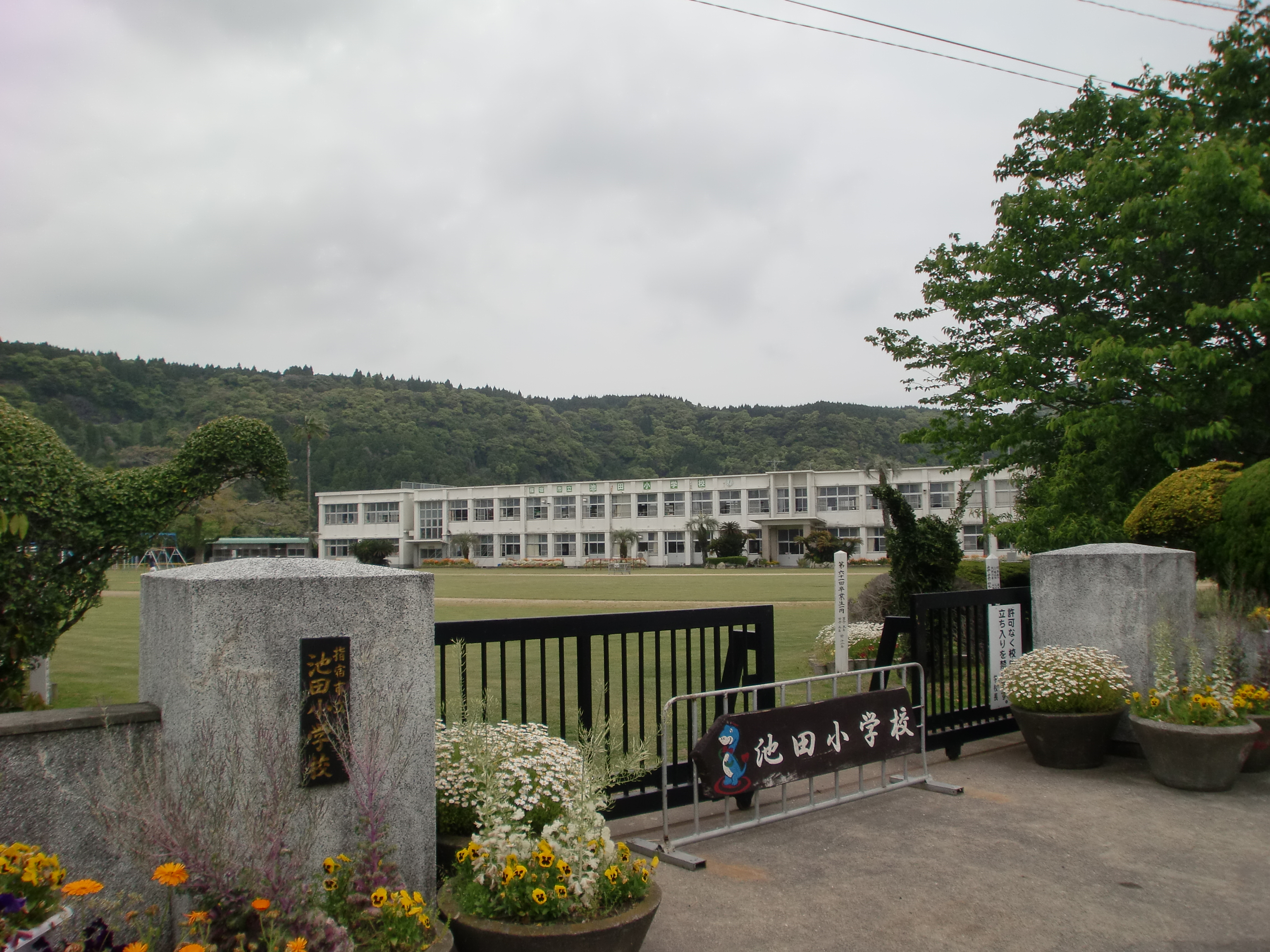 指宿市立池田小学校の外観。